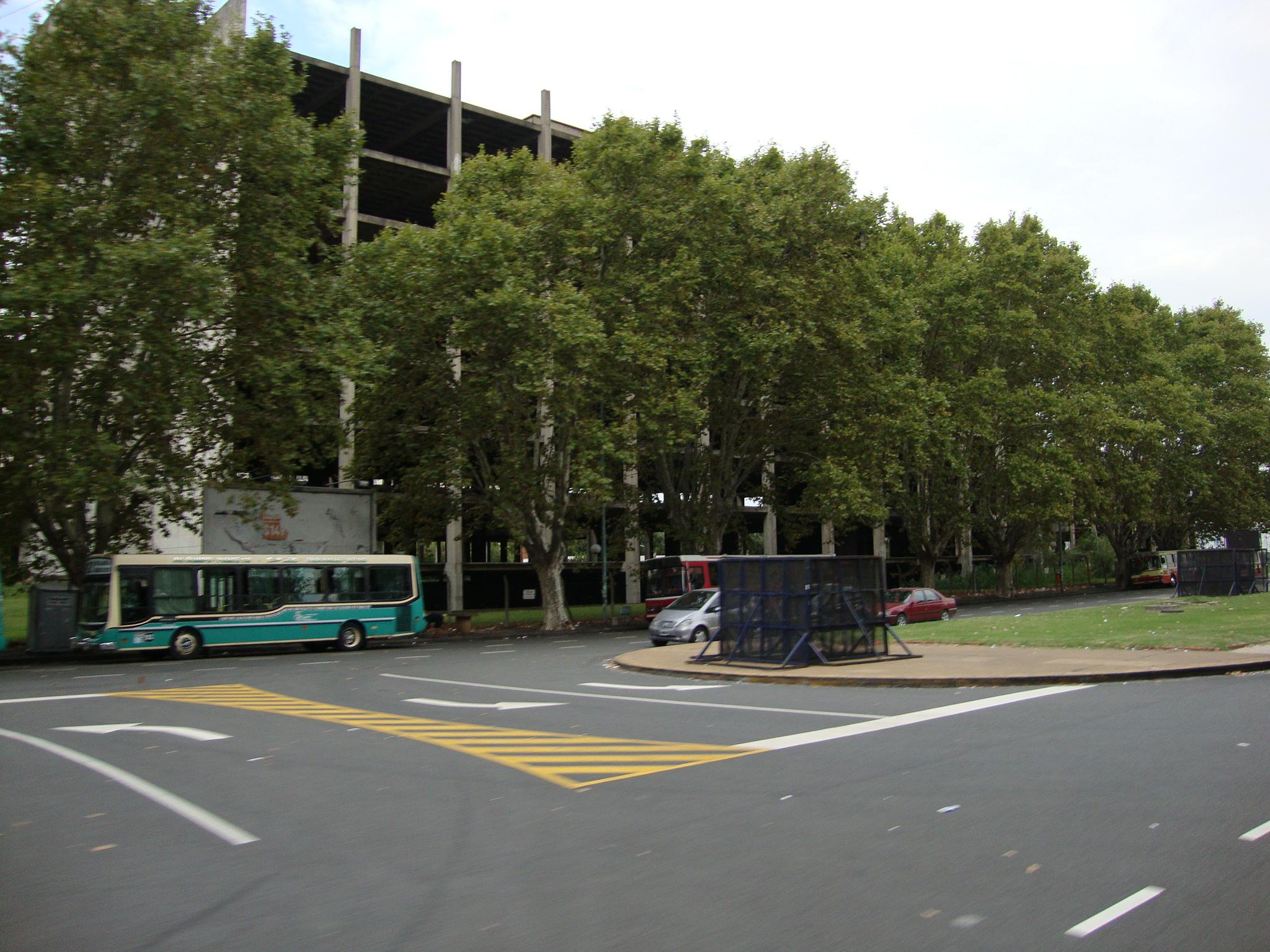 Edificio inconcluso del Hospital Aeronáutico de Buenos Aires en Retiro. Futuro Polo Judicial Retiro.